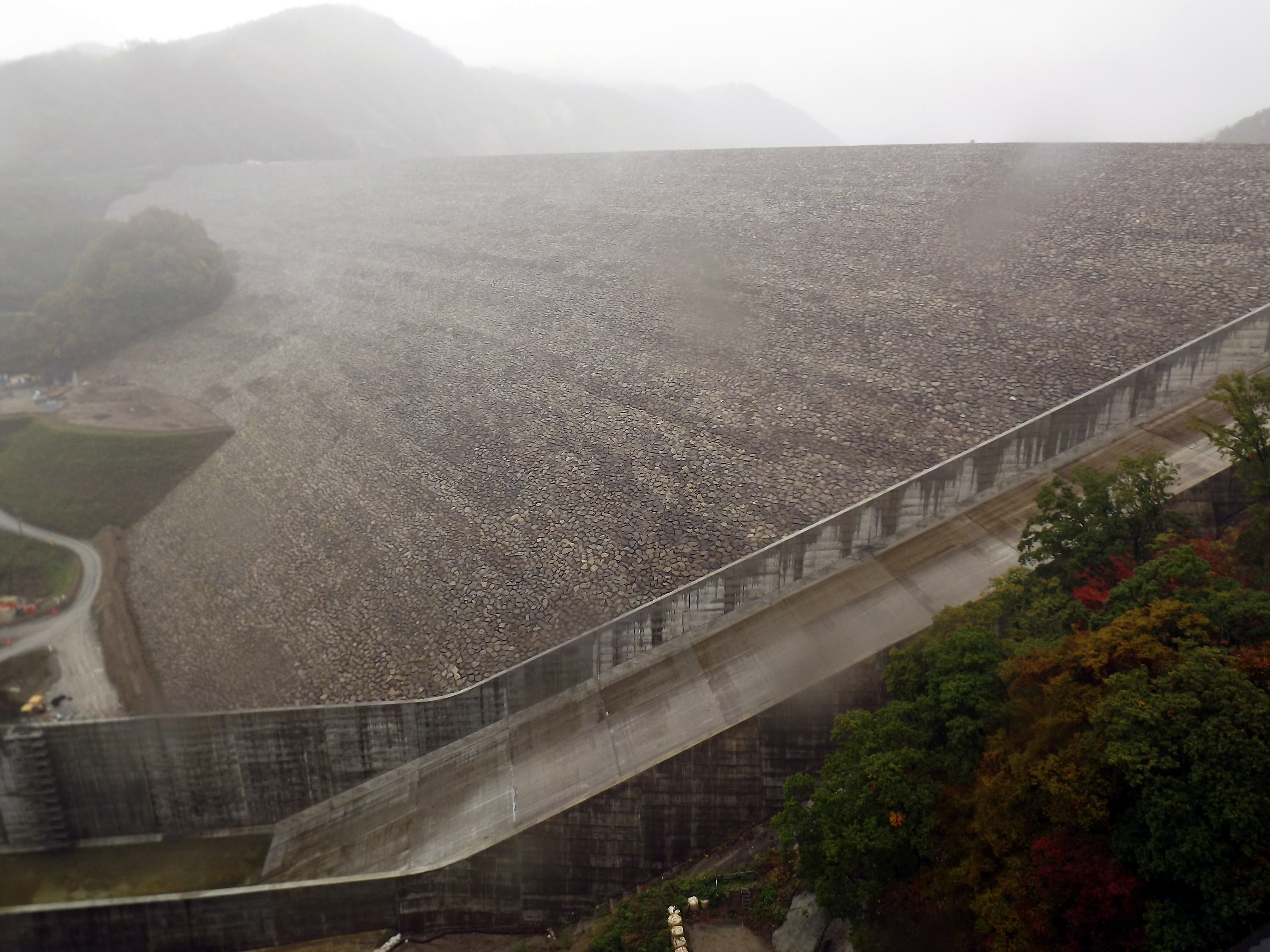 胆沢ダム（岩手県・胆沢川）